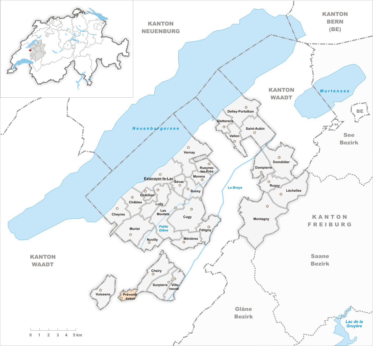 Municipality Prévondavaux